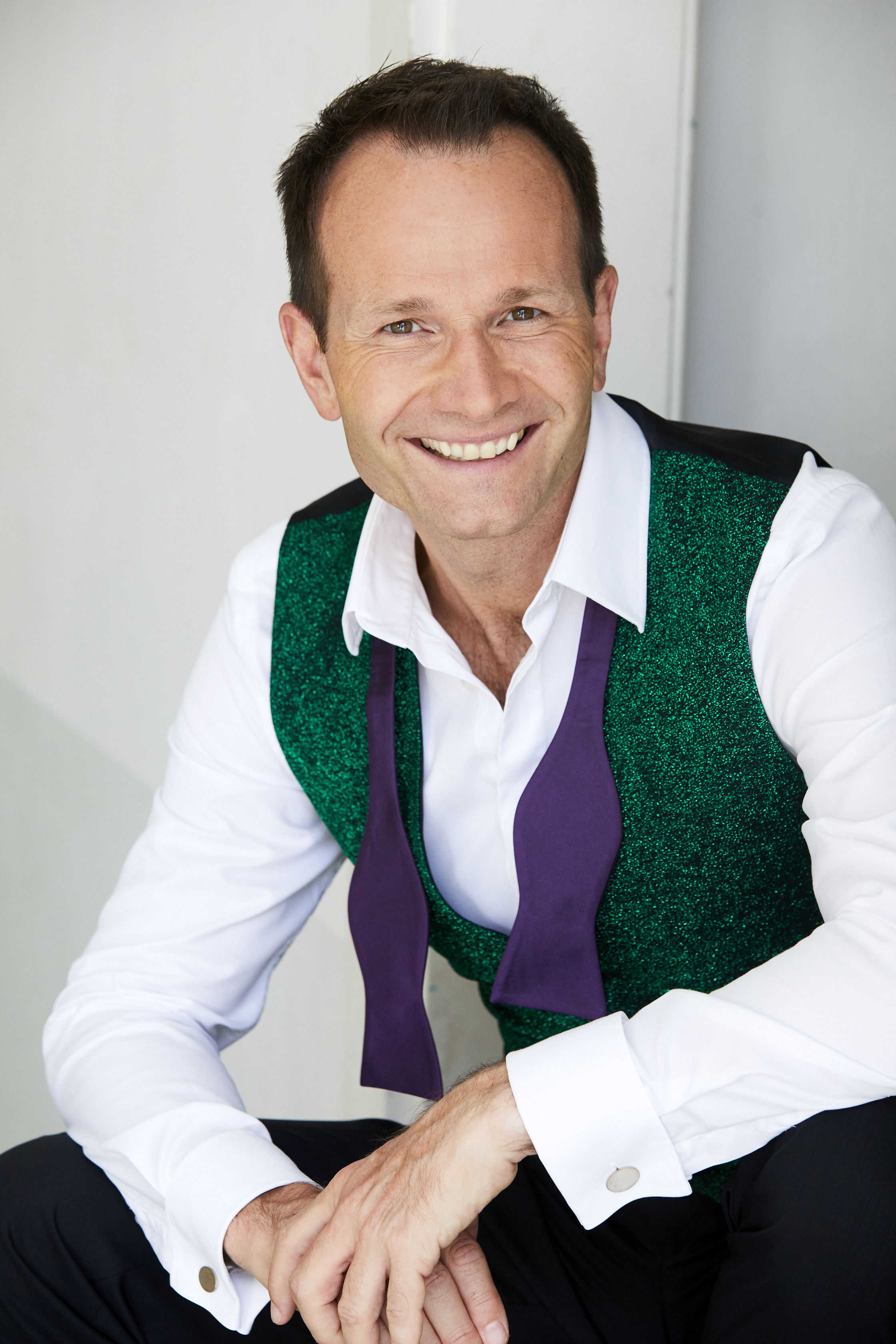 Alexander Rüdiger im bekannten TV Outfit